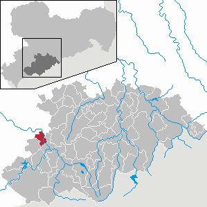 Bad Schlema im Erzgebirgskreis, Sachsen